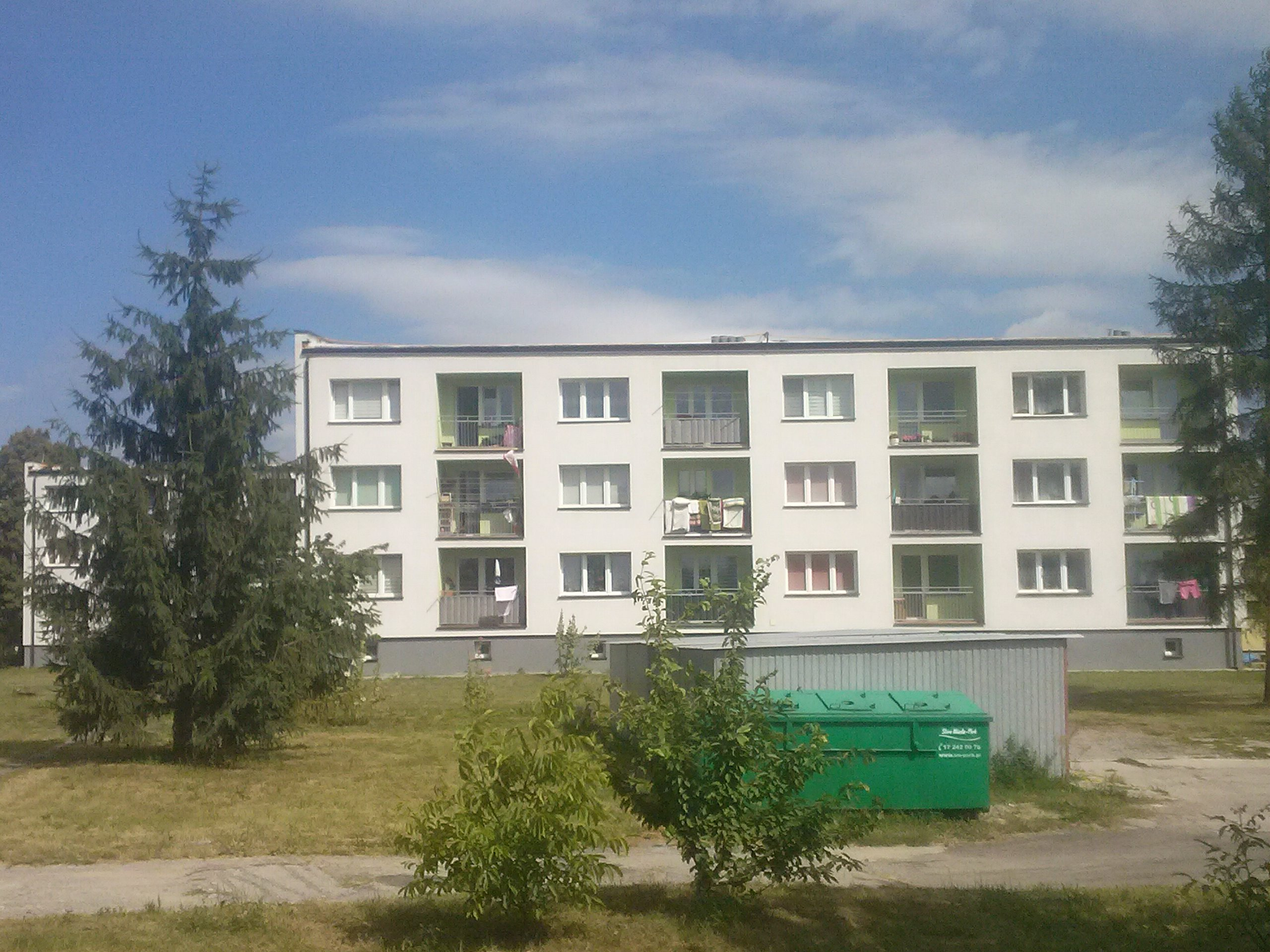 Bloki mieszkalne Rolniczo-Wytwórczego Kombinatu w Dębnie